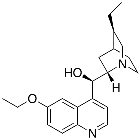 2d molecular structure of Optochin